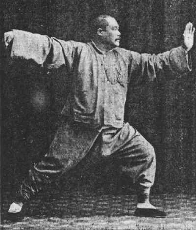 The Tai Chi Chuan master Yang Chengfu